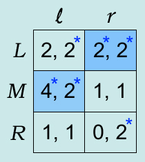 Auszahlungsmatirix und Nash-Gleichgewichte